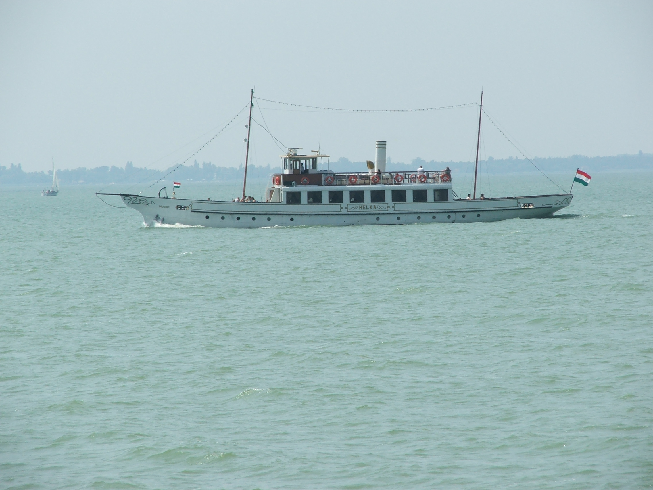 Helka hajó